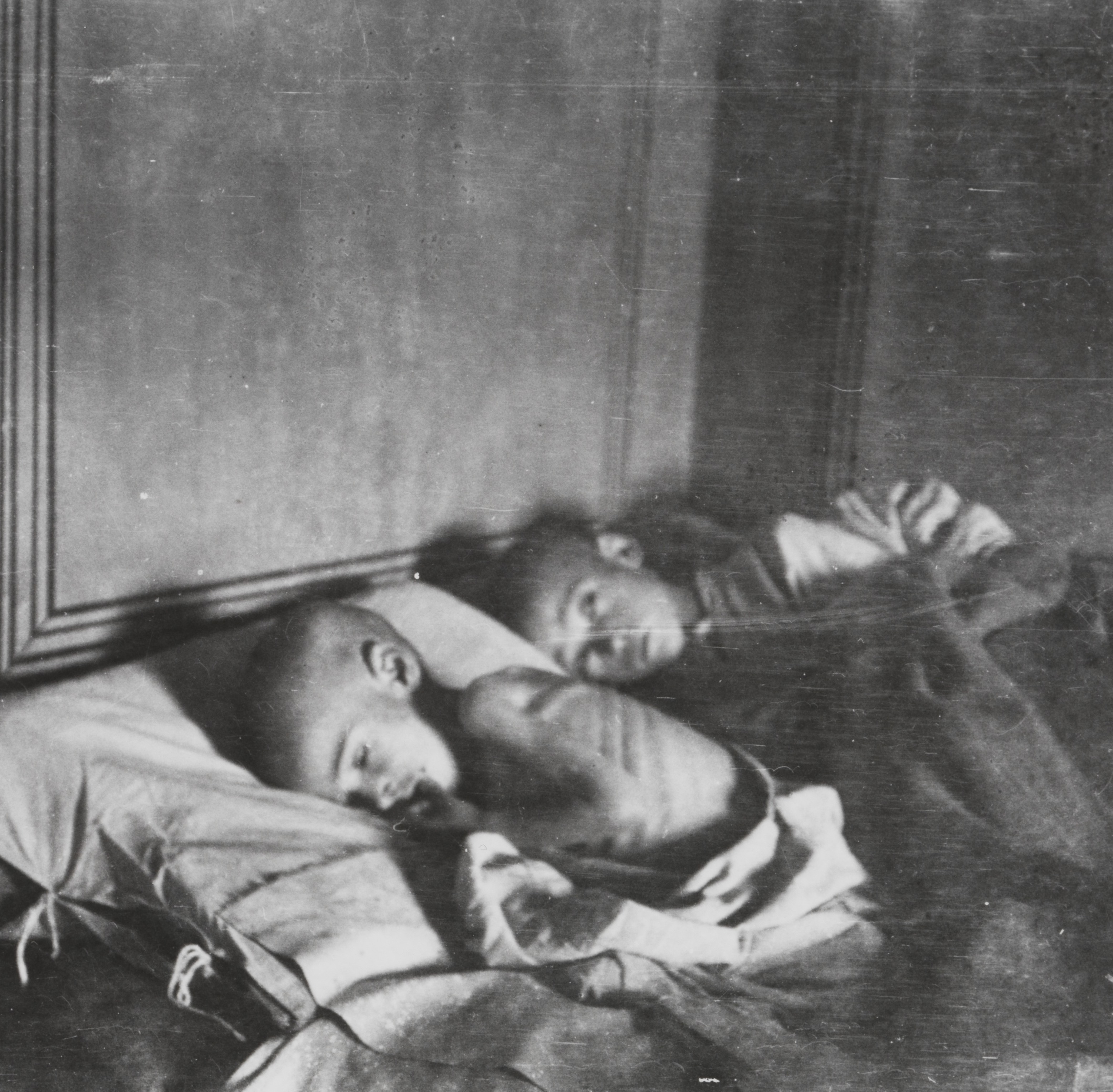 Utsultede barn i sykehussengene i Markstadtregionen. Ett av bildene fra reisen til Russland i november og desember 1921. På oppdrag fra Det Internasjonale Røde Kors besøkte Fridtjof Nansen områder som ble hardest rammet av hungersnøden. Depicted place: Russland, Marks